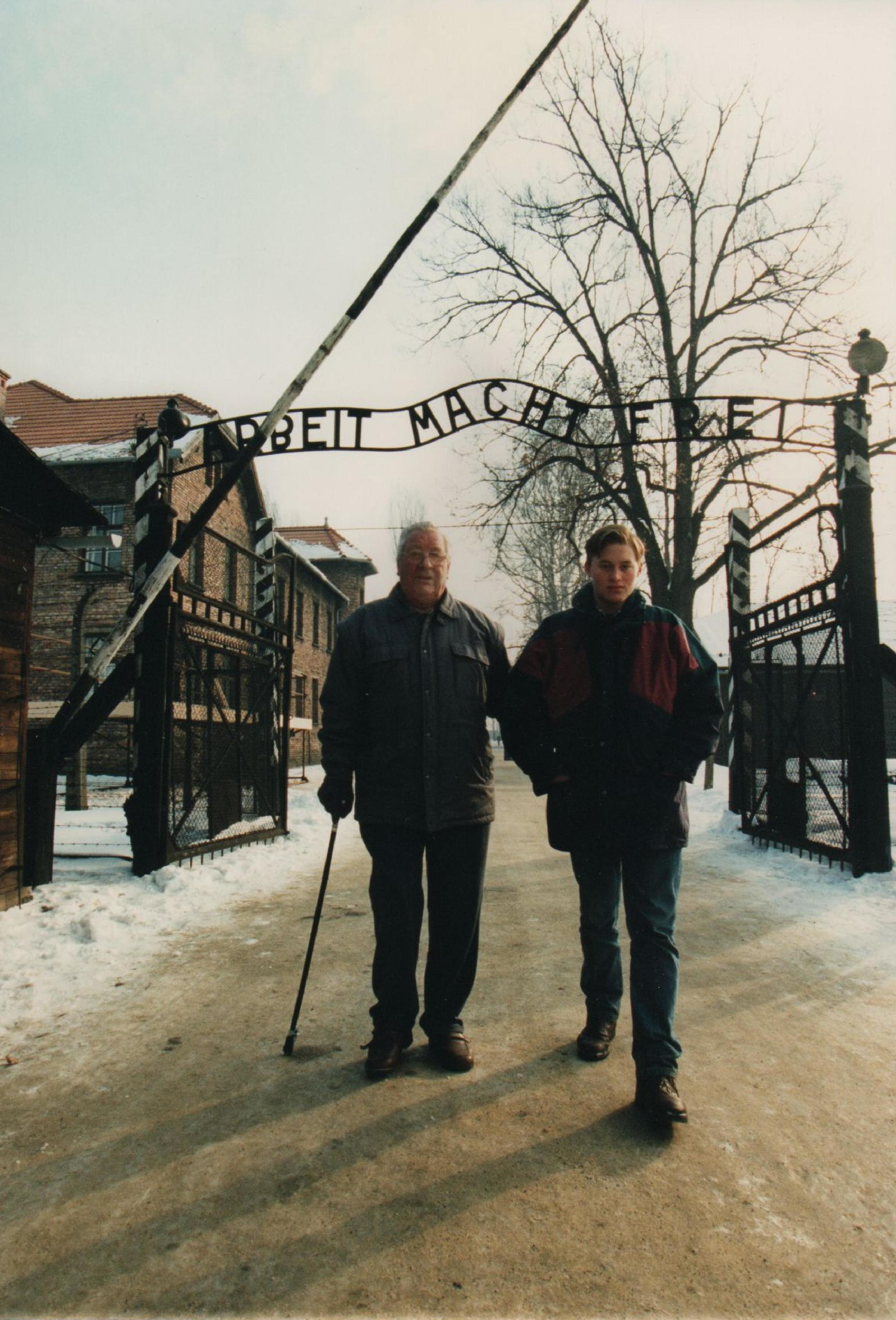 Forsiden fra utgave av "Du skal leve" fra 1995. Bildet viser Erling Bauck og hans sønnesønn Håvar i Auscwitz i januar 1995 i forbindelse med 50 års jubileet for den Røde Armes innmarsj i leiren.